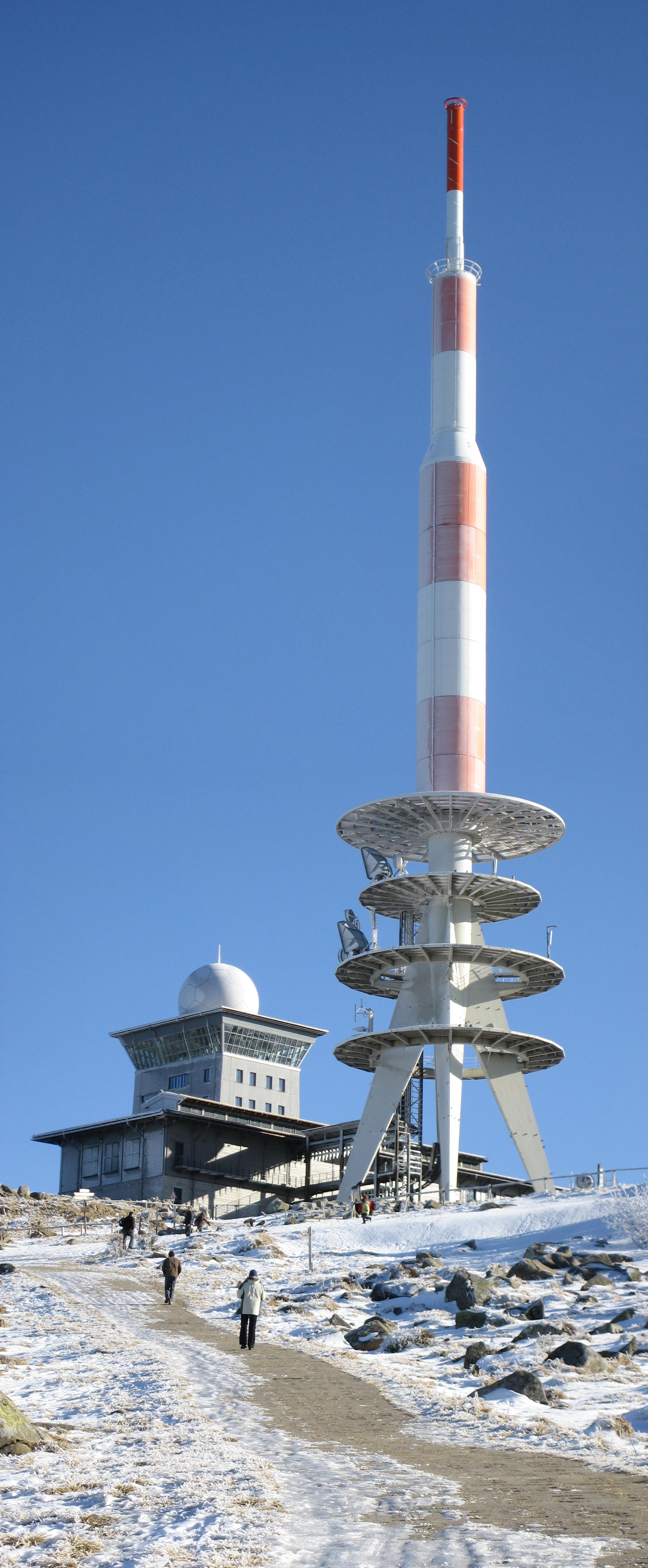 Sendeanlage/-turm Bocken